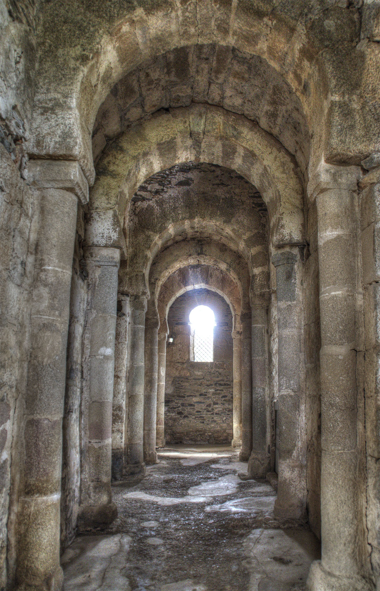 Transepto